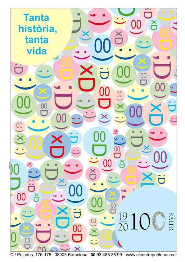 Els "Centrets"